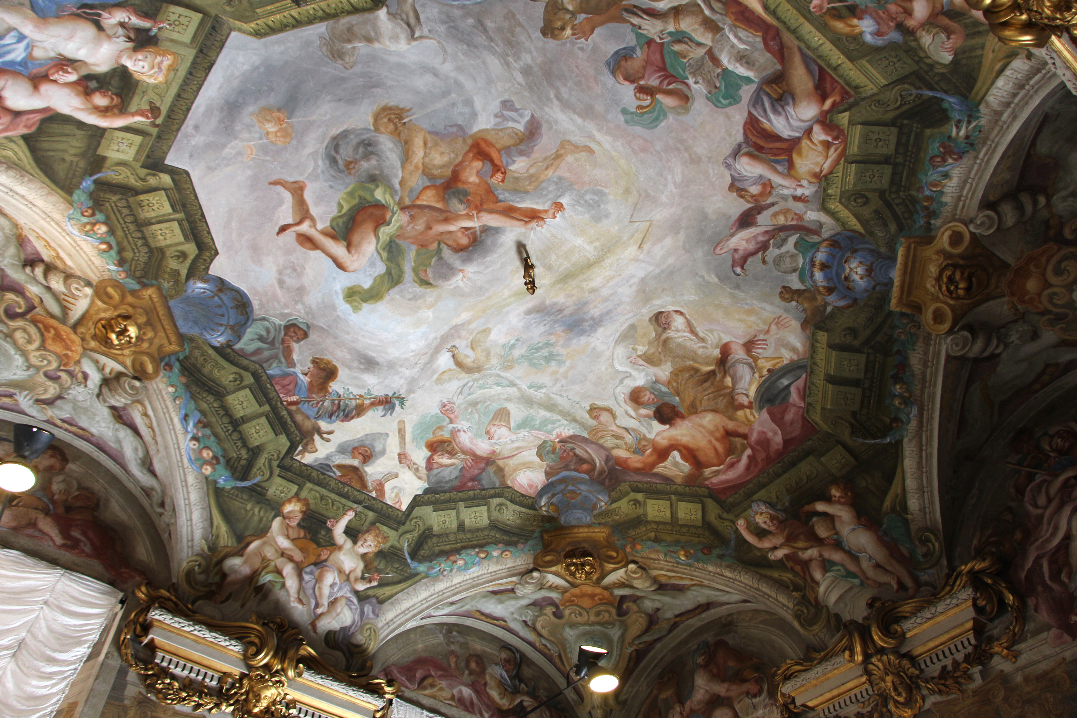 Palazzo Rosso - Musei di Strada Nuova The making of this document was supported by Wikimedia CH. (Submit your project!) For all the files concerned, please see the category Supported by Wikimedia CH. This is a photo of a monument which is part of cultural heritage of Italy.